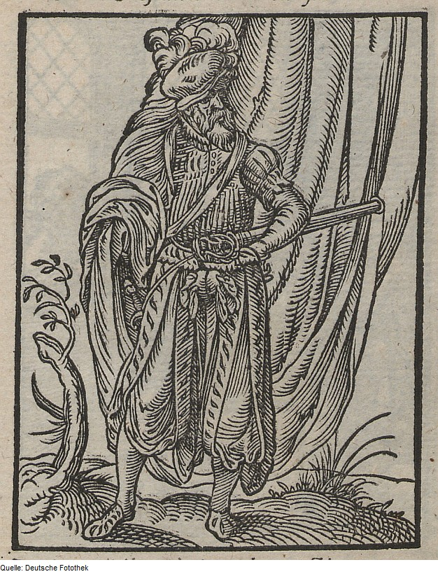 Original image description from the Deutsche Fotothek Ständebuch & Amt & Militär & Fähnrich